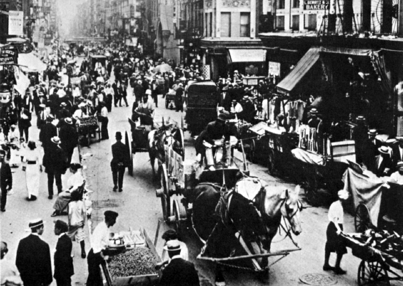 Street scene, 1912 - Lewis Wickes Hine